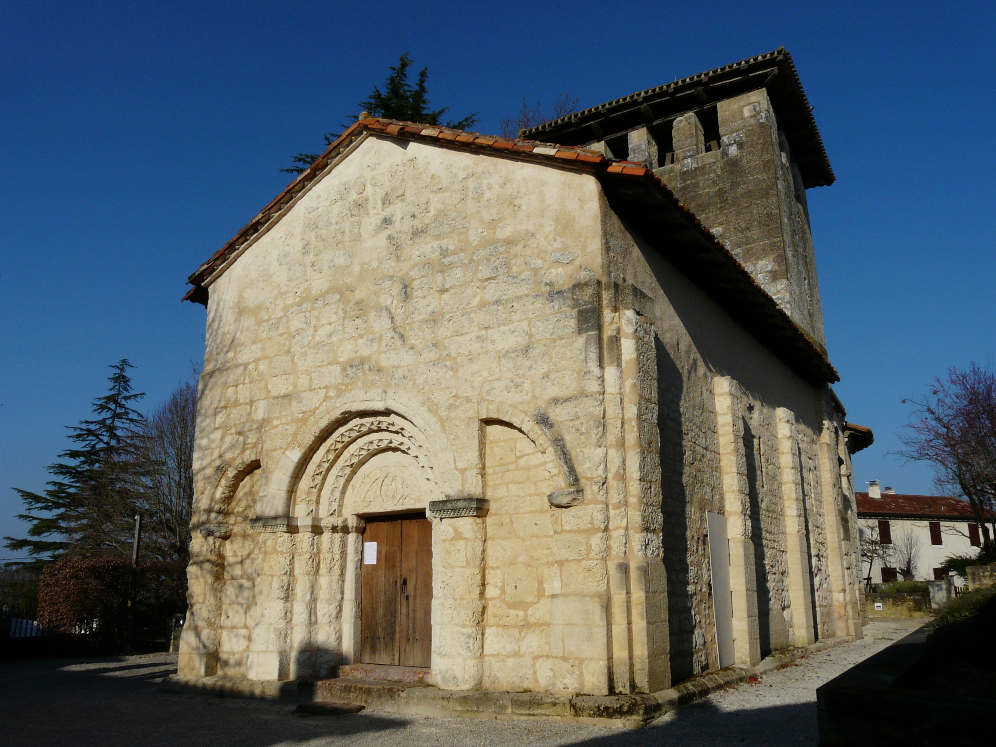 La façade occidentale de l'église Saint-Pierre de Faye, Ribérac, Dordogne, France.